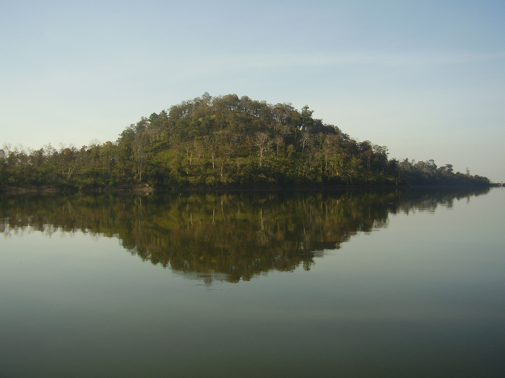 Mũi Hảo Vọng